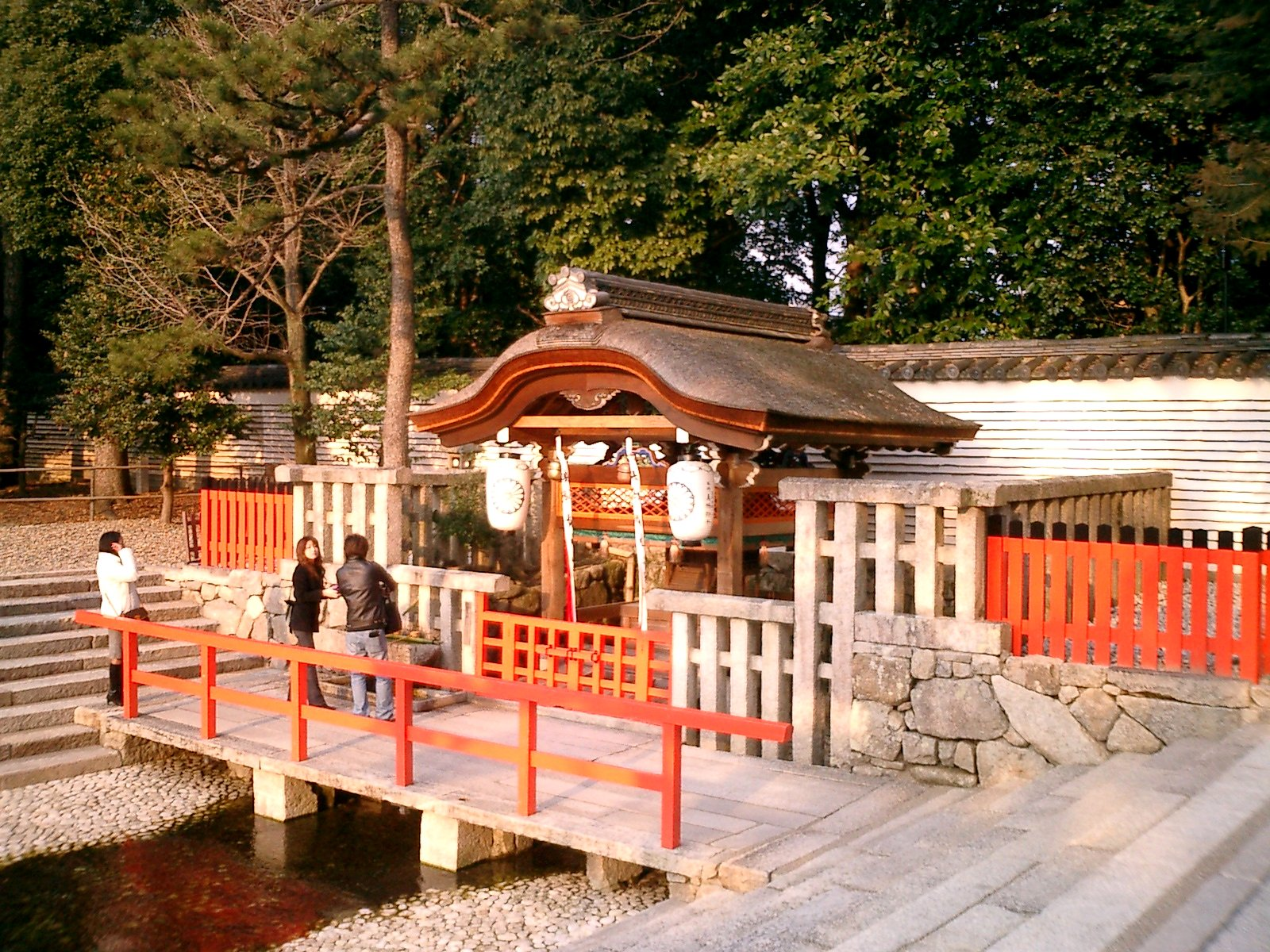 Shimogamo_Jinja_Mitarasi_sha